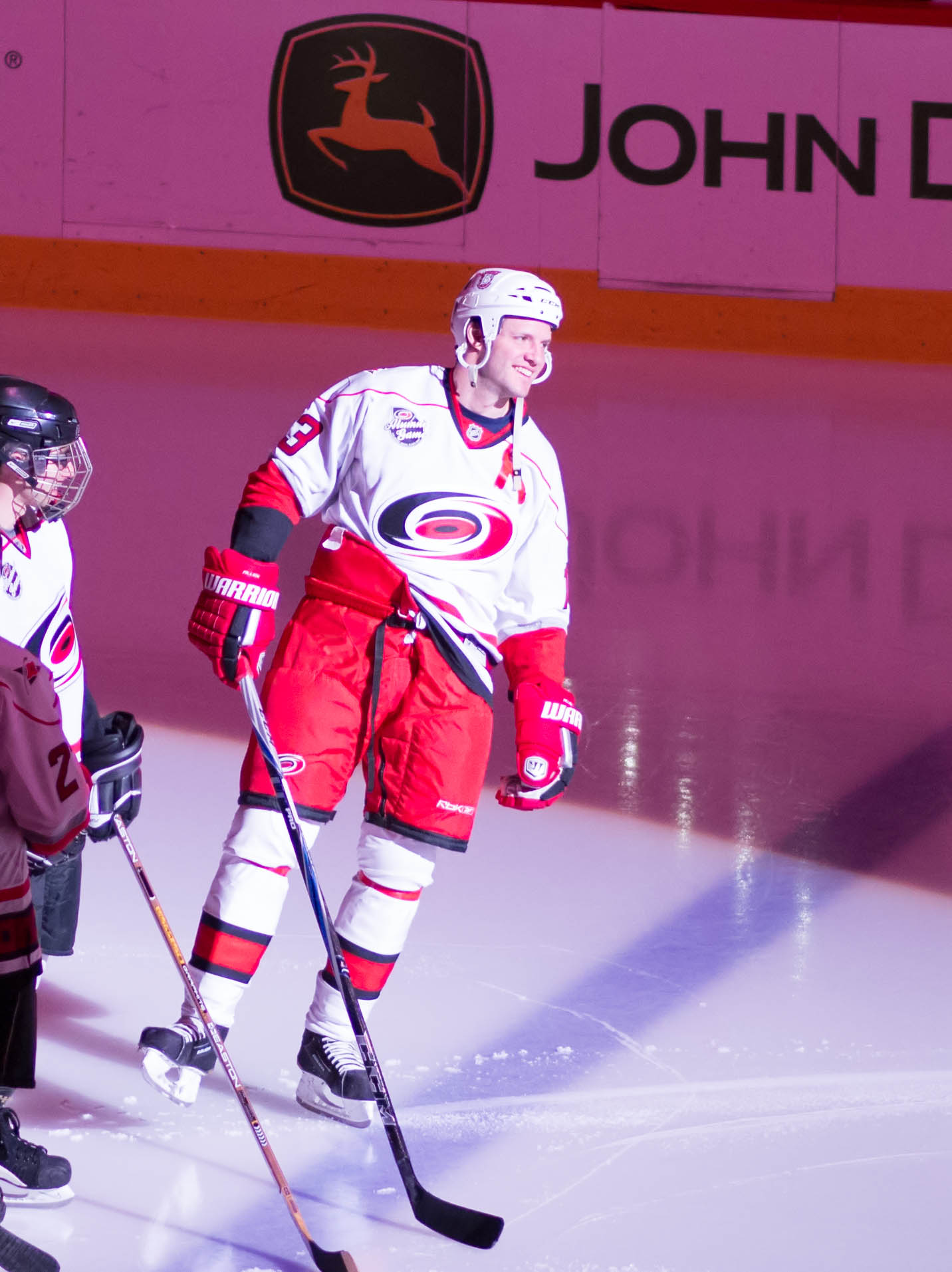 Bates Battaglia — Carolina Hurricanes.